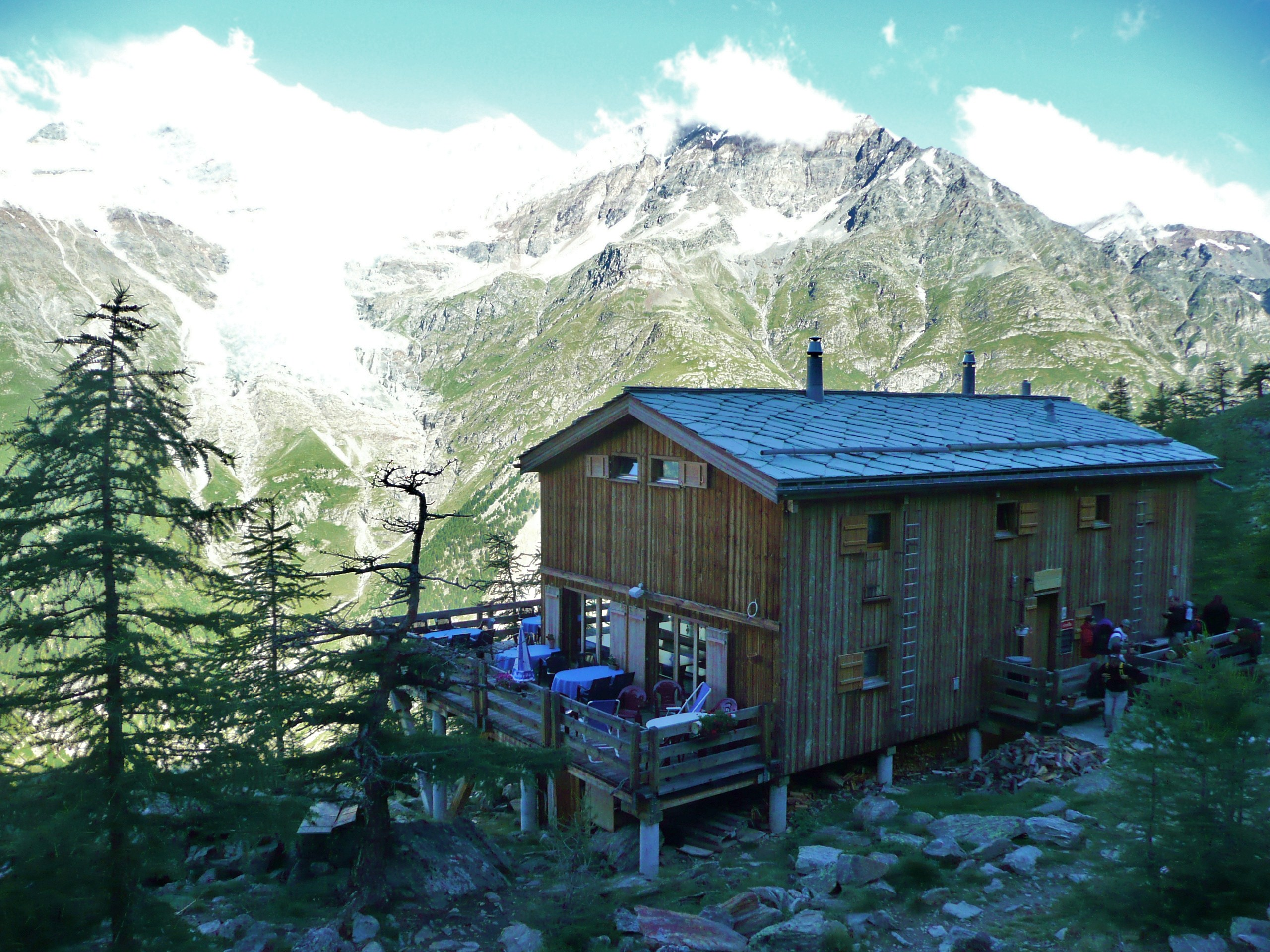 Europahütte